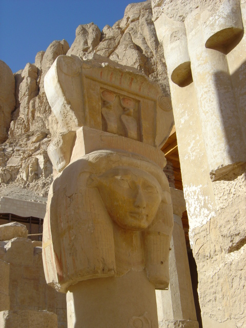 Eigen foto Ben Pirard 2007